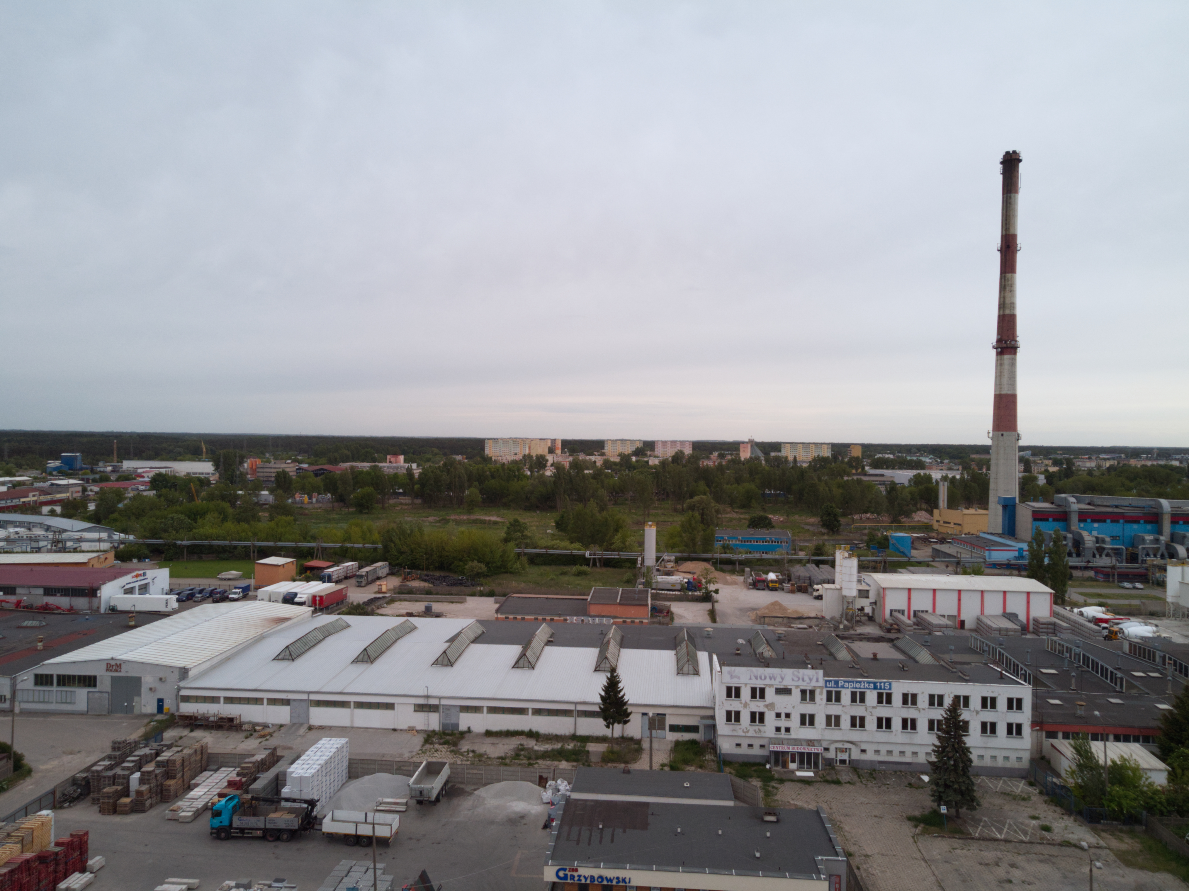 Kazimierza Wielkiego (2020 r.)